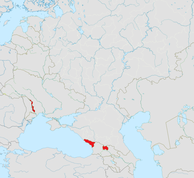 民主主義と民族の権利のための共同体（Community for Democracy and Rights of Nations、Содружество непризнанных государств）加盟国の地図（Map）。